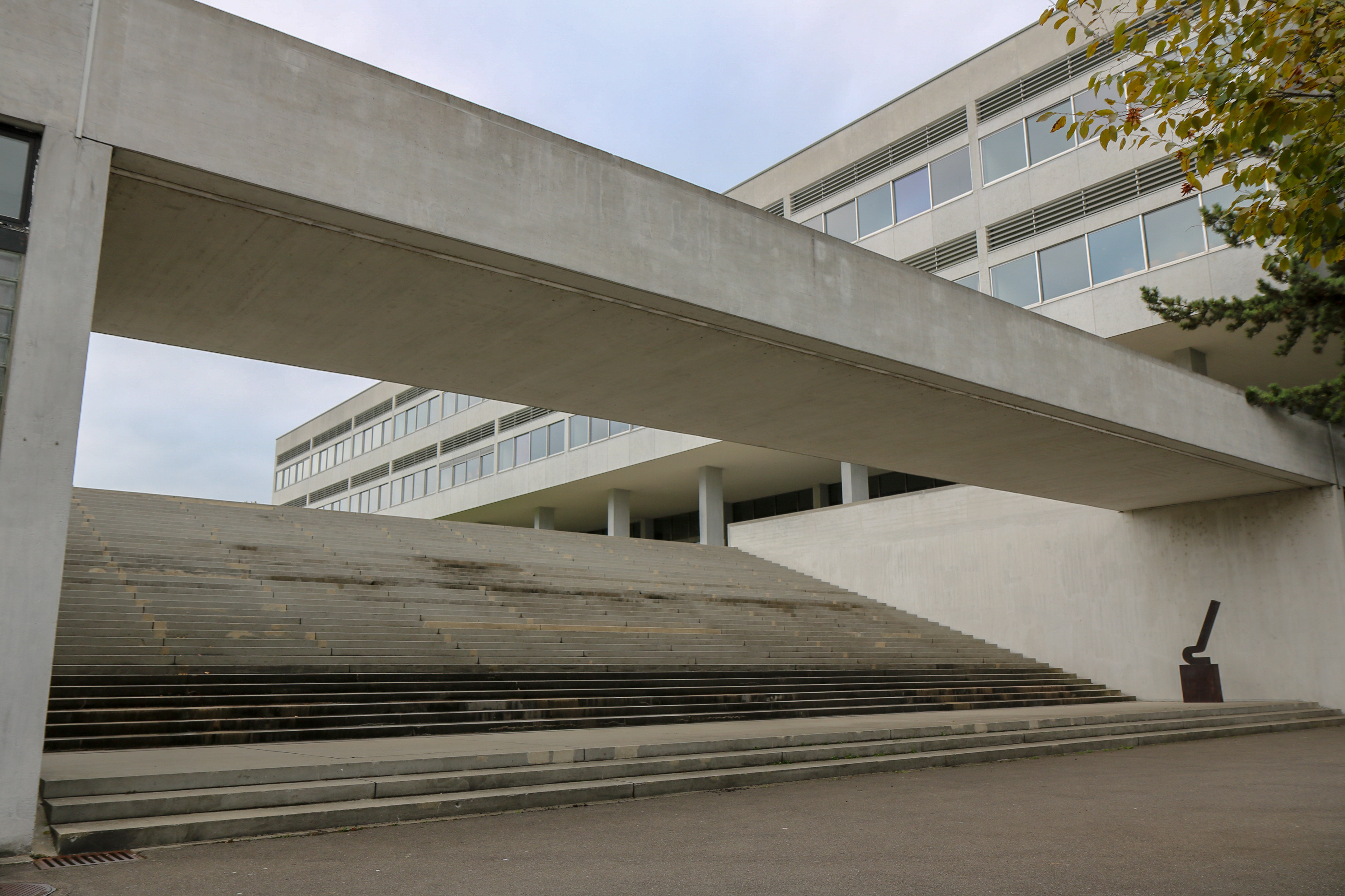 Bilder aus der Kantonsschulanlage Freudenberg-Enge 2018 - Blick auf das Schulhaus der Kantonsschule Enge